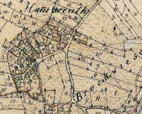 Heinersreuth auf dem Urkastaster von Bayern